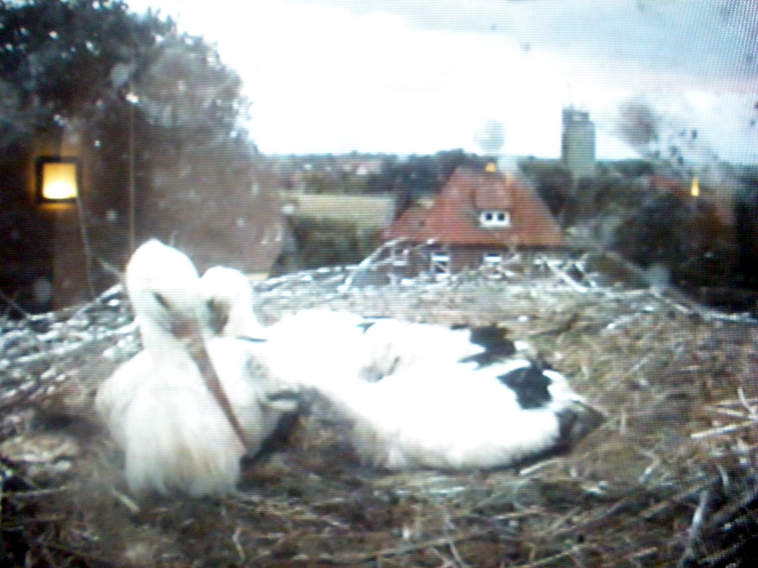 Storchennest in Bleckede - Kameraübertragung